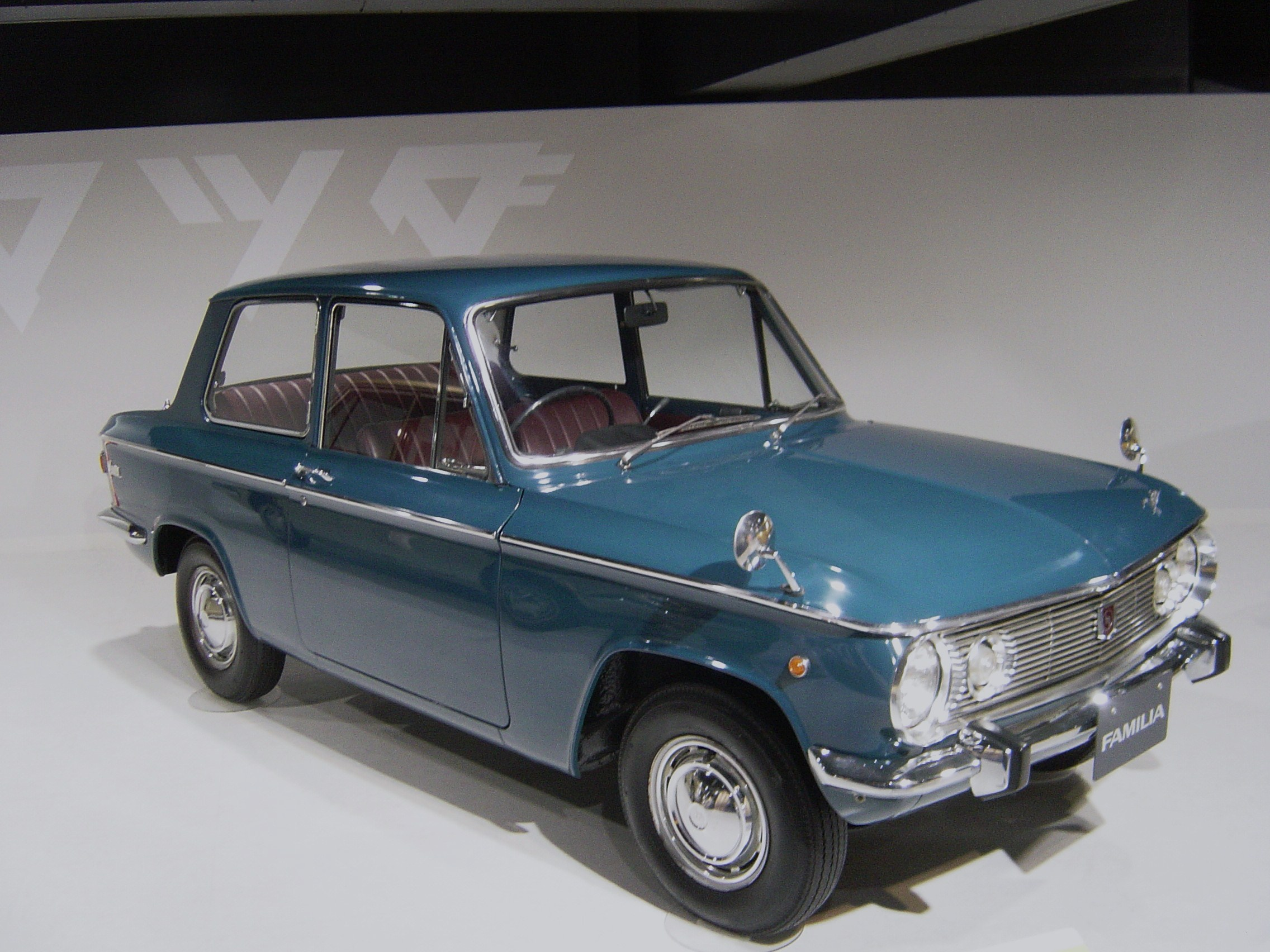 Mazda FAMILIA(マツダ・ファミリア),Mazda Museum